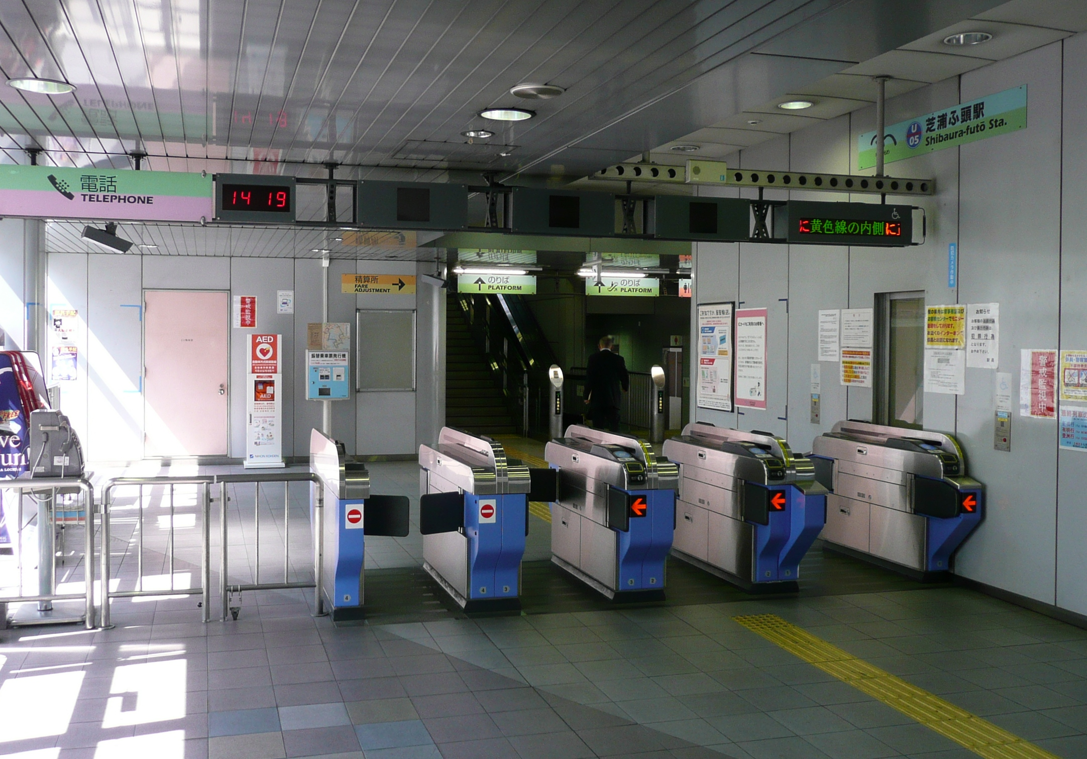 芝浦ふ頭駅改札口